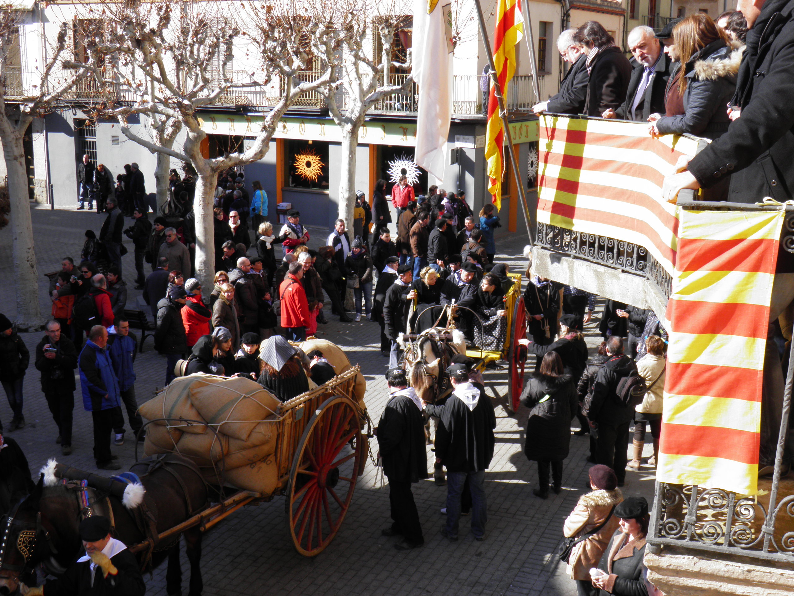 Oriol Pujol des del balco de l'ajuntament amb traginers del a cercavila de la festa del traginer de Balsareny.